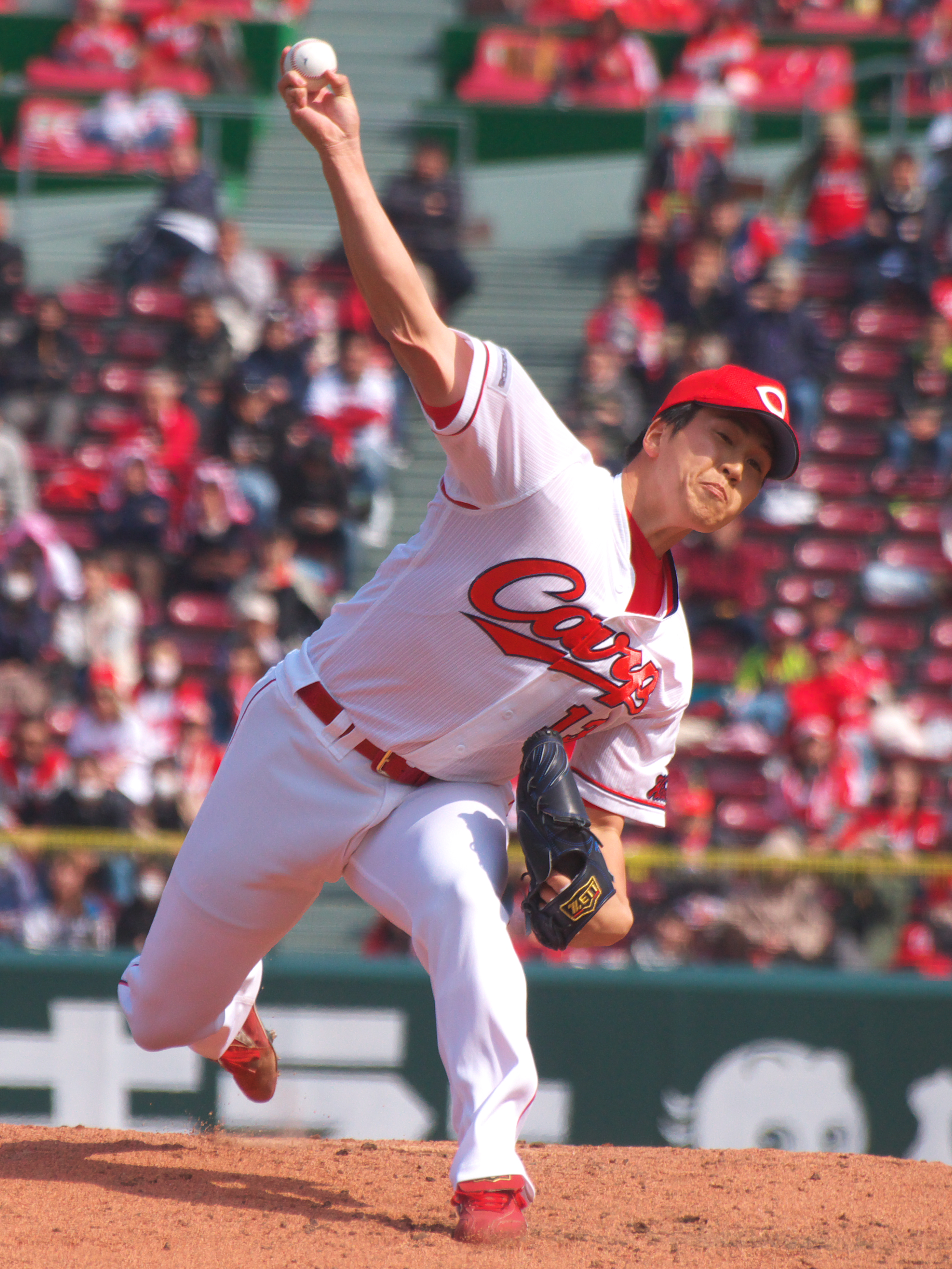 広島東洋カープ矢崎拓也